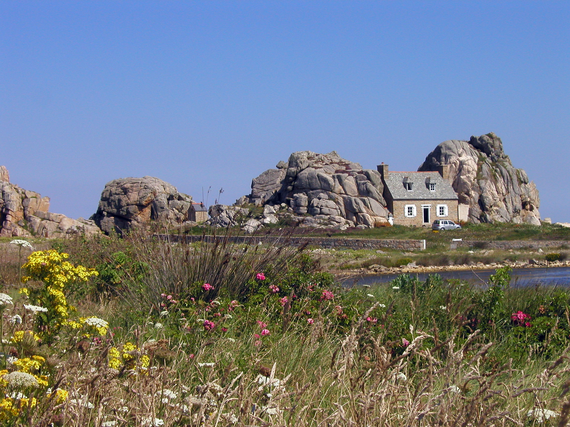 Eines der beliebtesten Fotomotive in der Bretagne: Das „Haus zwischen den Felsen“ bei Plougrescant